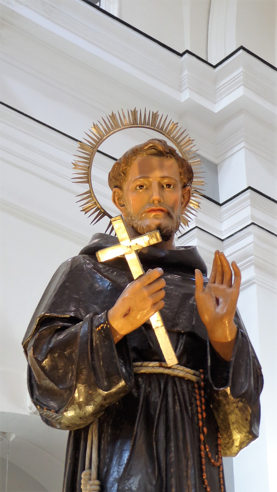 Scultura di Virtù Morale di Cristoforo Milanti